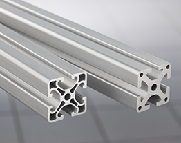 Aluminiumprofile von item Industrietechnik GmbH